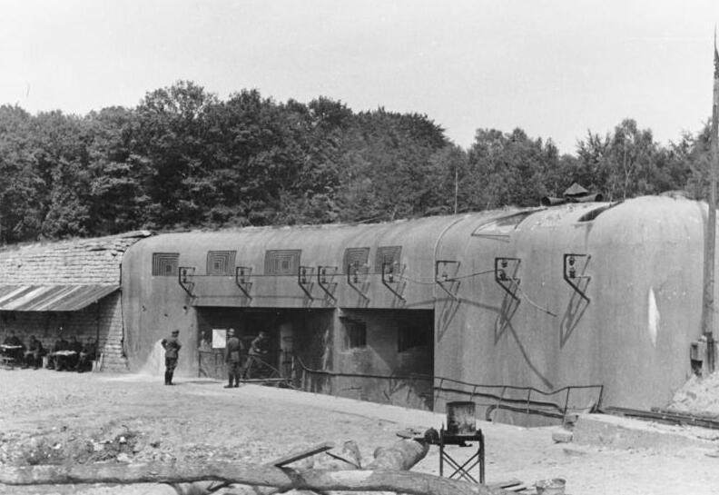 Maginot-Linie. Eingang zum Panzerwerk Schöneburg. August 1940 Schöneburg, 39 km NNO Strassburg, Frankreich Bildberichter: Kühn Negativ-Nr. S 19/35